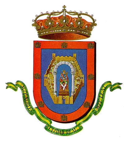 Escudo de Ciudad Real, España, según la versión oficial del ayuntamiento.